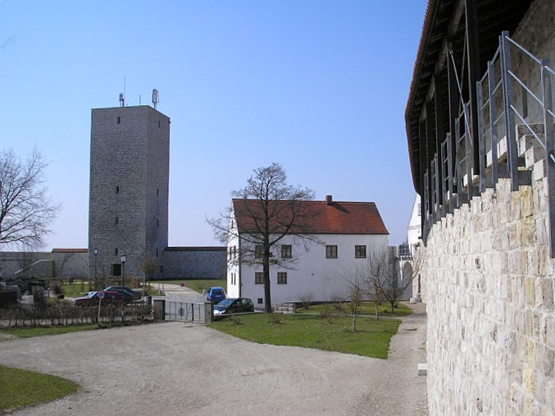 Burg Vohburg (Oberbayern). Blick vom Pflegschloss zum rekonstruierten "Bergfried".